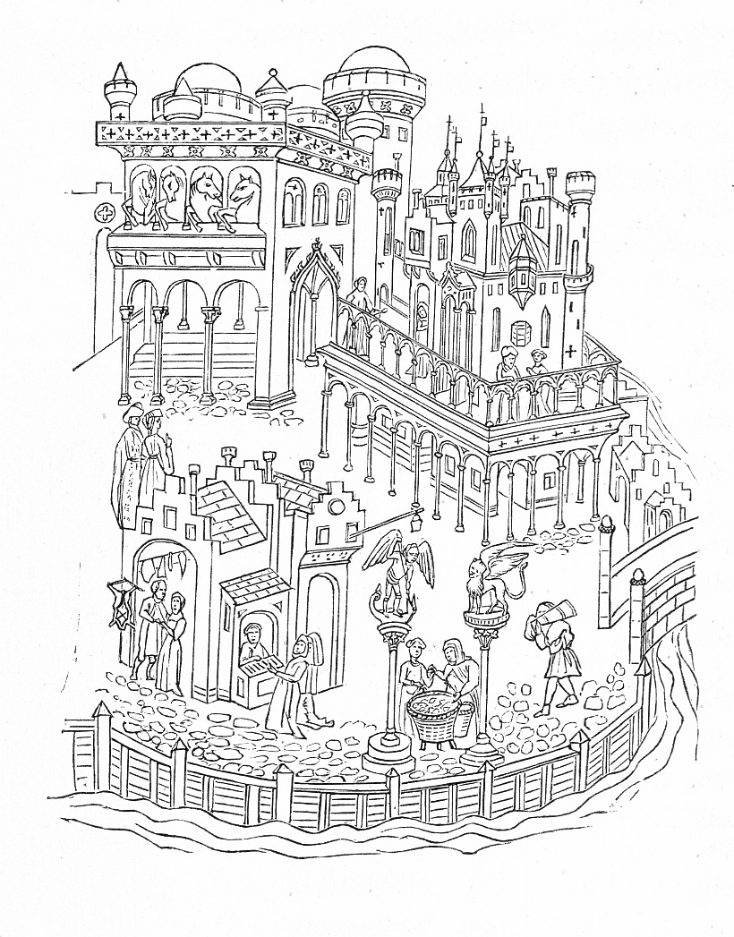 Bilder aus dem in derselben Kategorie befindlichen Artikel aus den Mittheilungen der kaiserl. königl. Central-Commission zur Erforschung und Erhaltung der Baudenkmale Band 1, 1856.